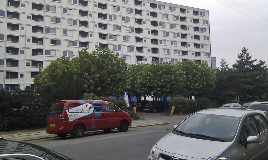 Eget foto taget 24. august 2011. Reersøgade i København, hvor den kommende metrostation, Poul Henningensens Plads, vil blive opført.